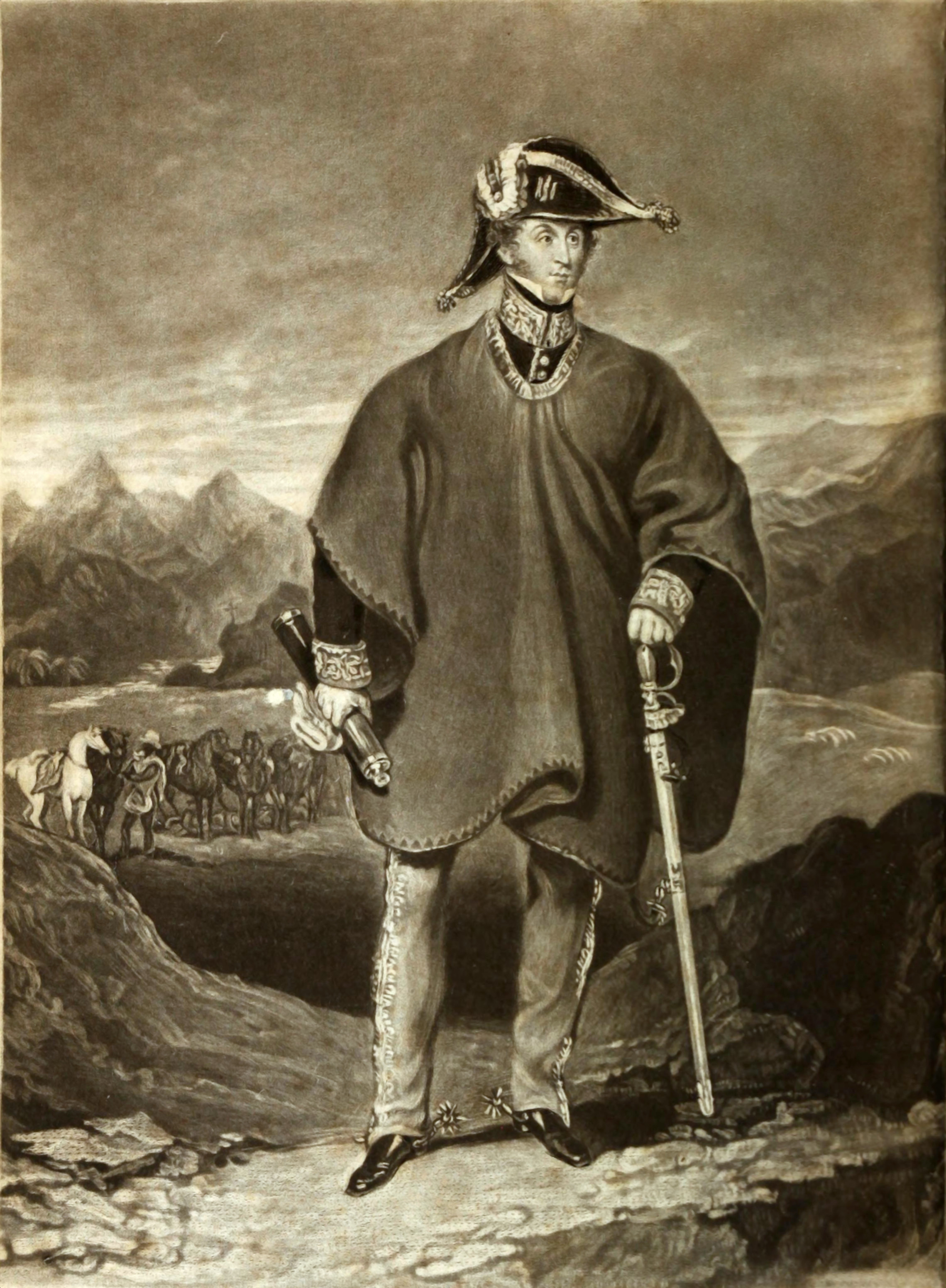 Grabado del General William Miller